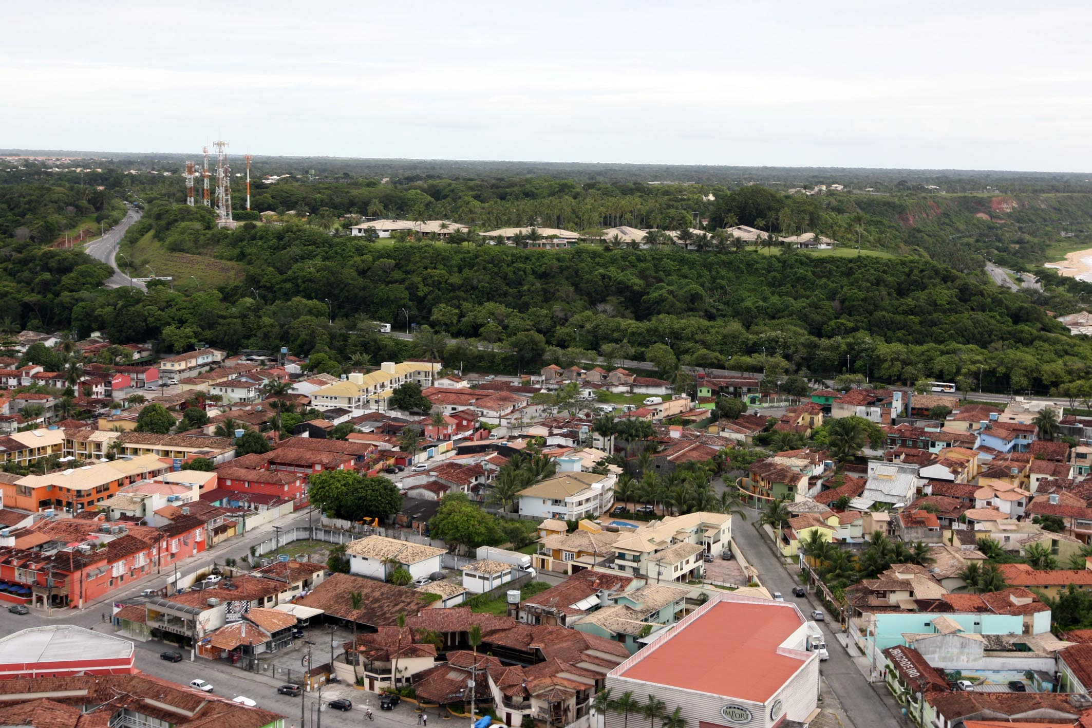 Operação na Busca de Criminosos Ligados ao Tráfico e Vandalismo na Região de Porto Seguro. Na Foto:Bairro do Baianão Foto: Carla Ornelas/SECOM